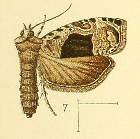 Eccopsis nebulana